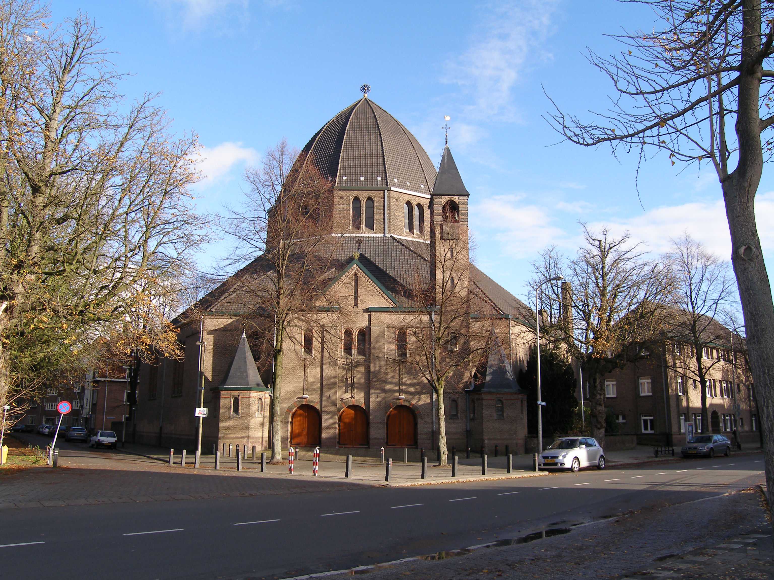 St. Aloysiuskerk by Hendrik Willem Valk in 1924.